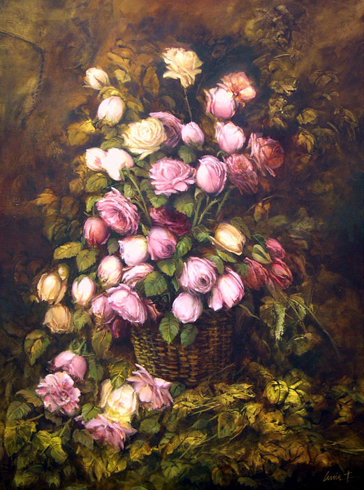 S/T, 2007, óleo sobre lienzo, 100 x 80 cm.